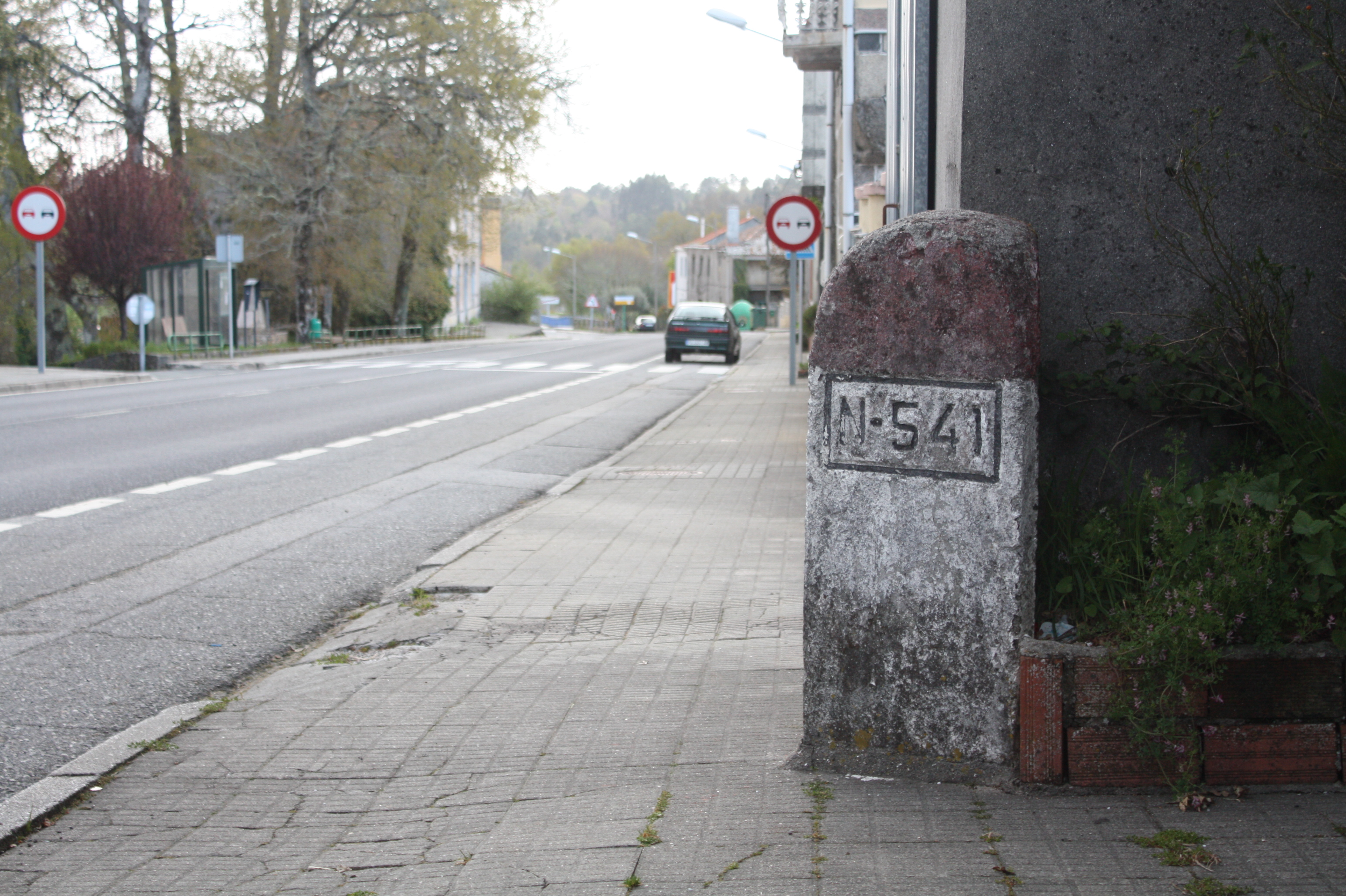 Fito quilométrico na estrada N-541 en Vilapouca, Ventoxo, Forcarei